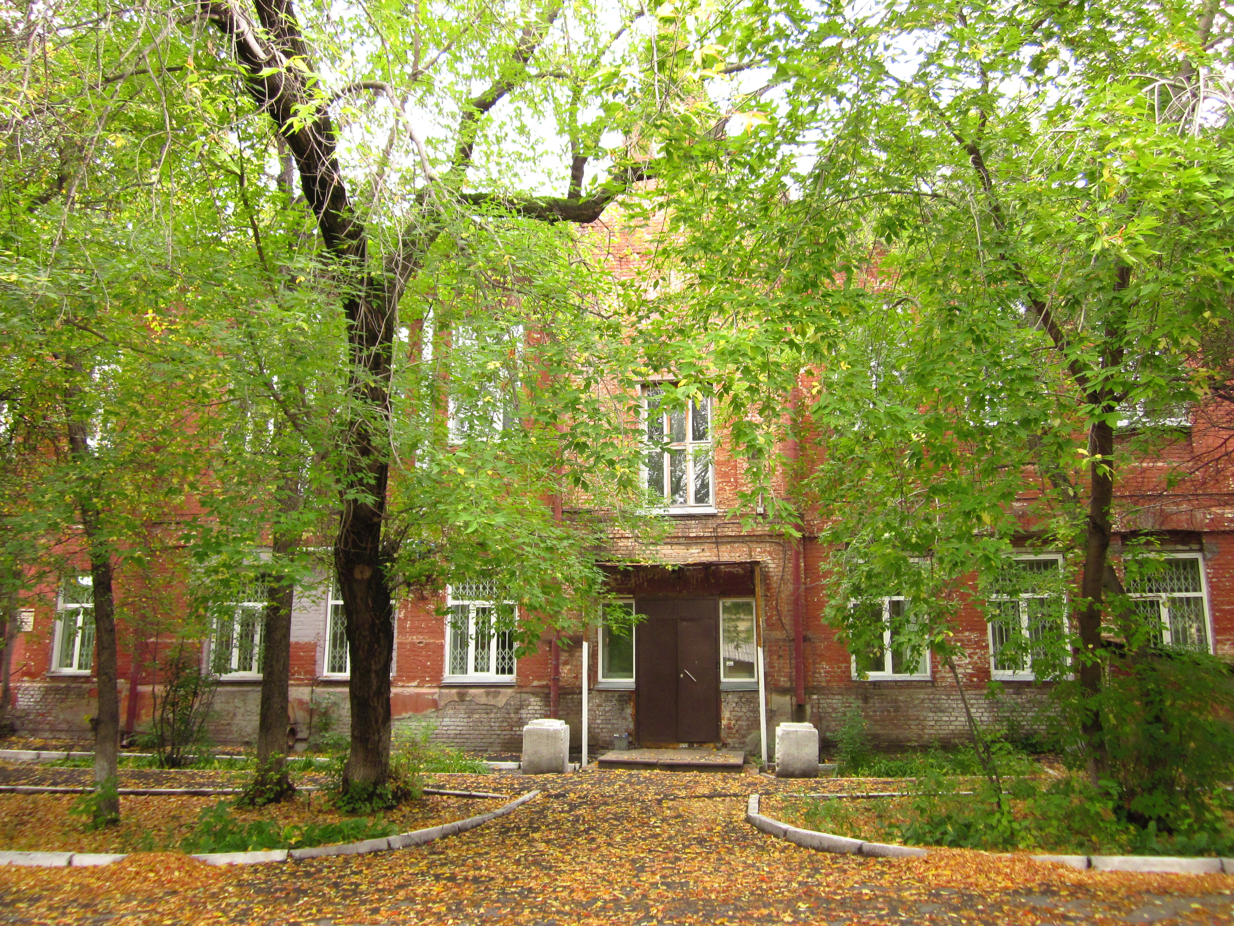 Заразная больница ул. Семьи Шамшиных, 40 к 1 Новосибирск Архитектор Ф. Рамман, 1912 г